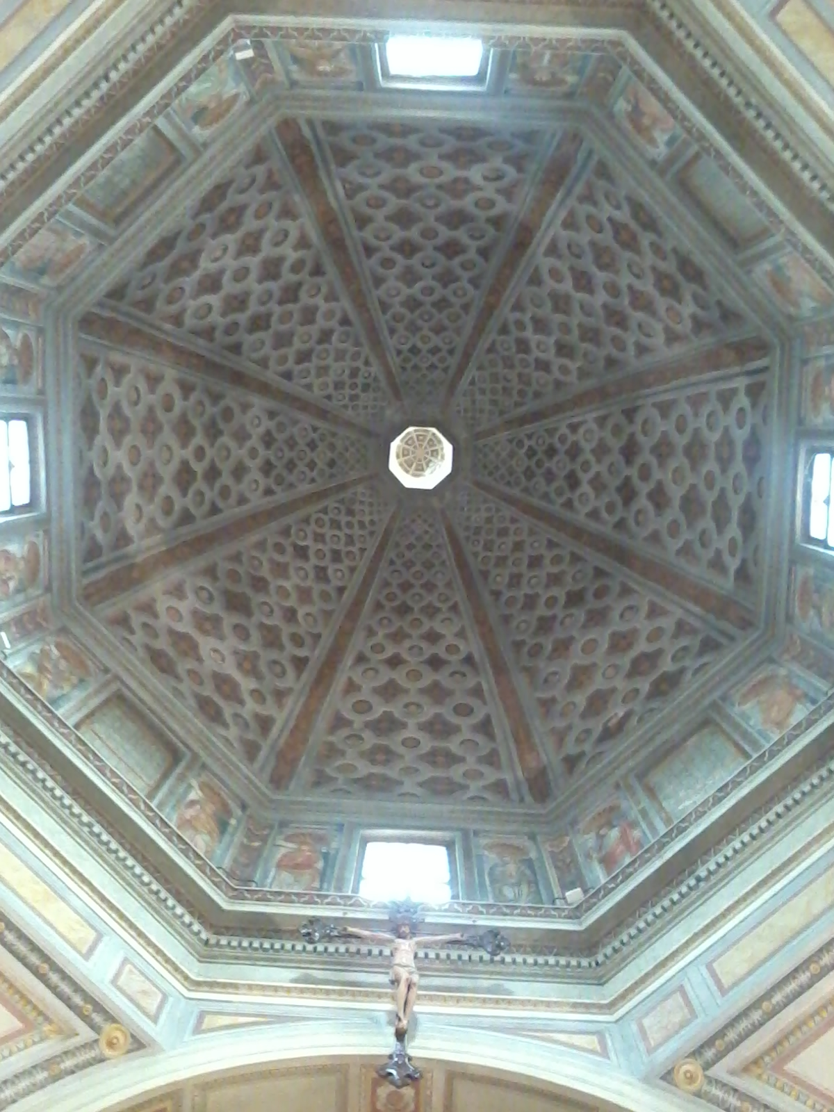 Cupola della chiesa di San Nicola nel santuario di Corbetta (MI) - Italy